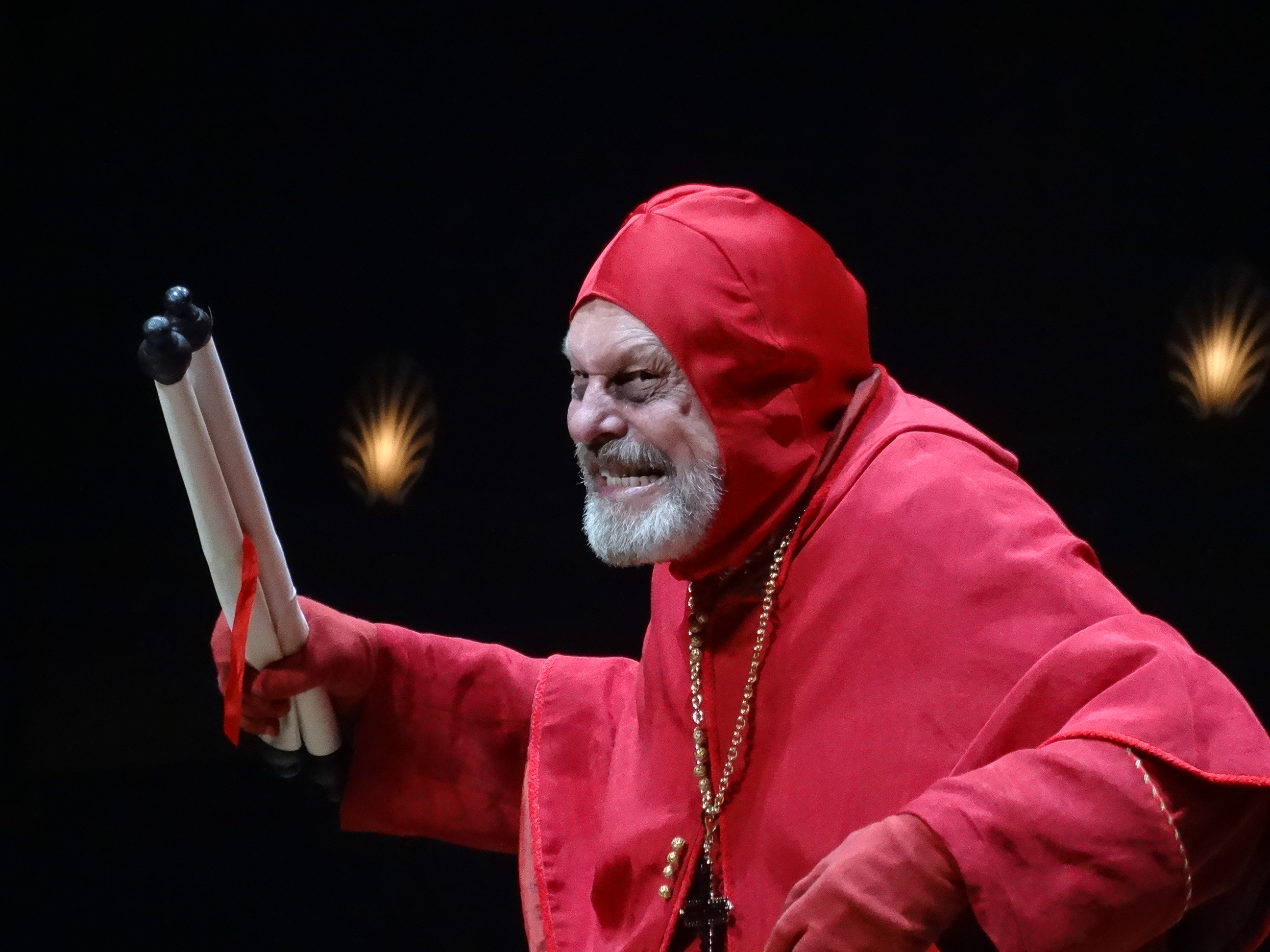 Photo 02-07-14 12 47 50